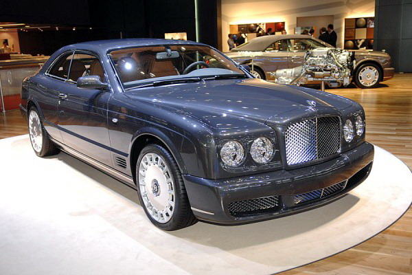 Bentley Brooklands 2007.